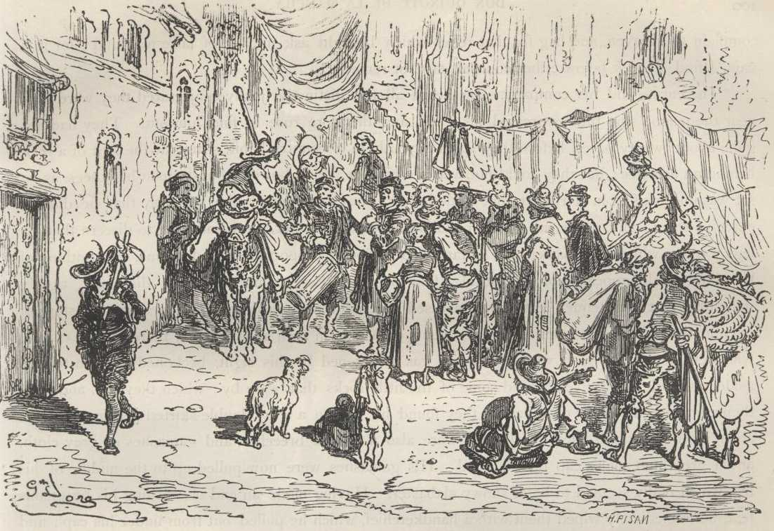 Ilustração de Gustave Doré para a edição de 1863 de "Dom Quixote" de Miguel de Cervantes